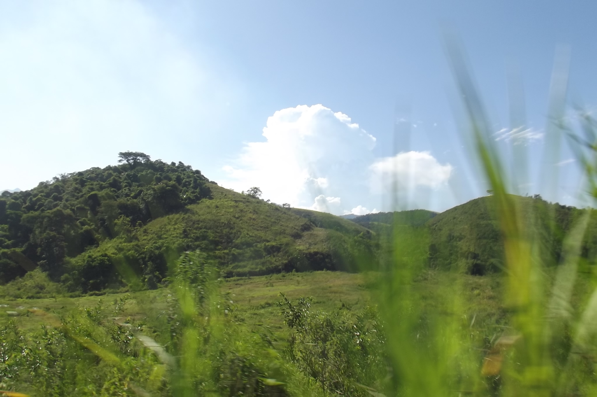 morros e mata paisagem da região na serra de visconde de mauá 10